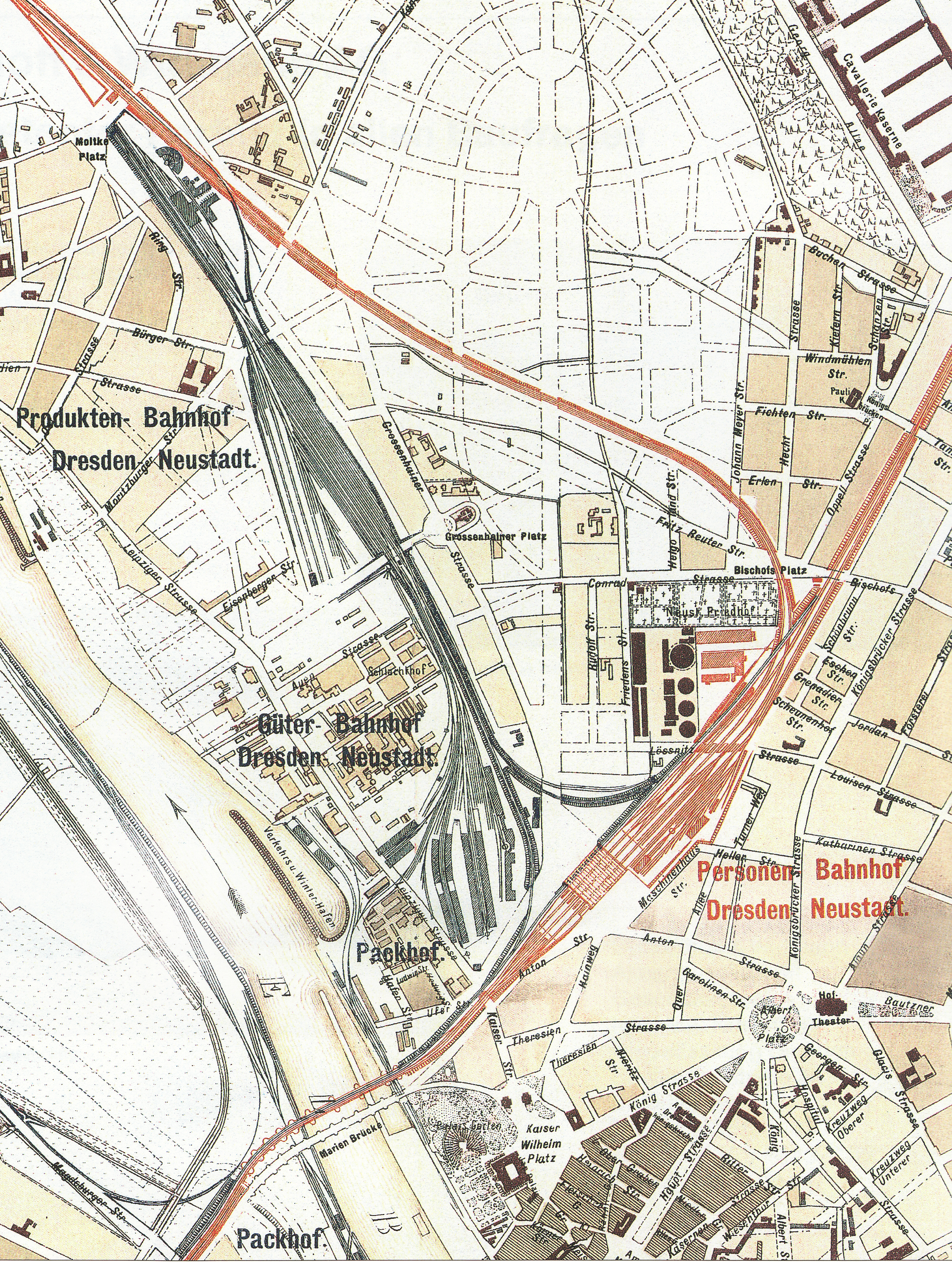 Entwurfplanung für den neuen Bahnhof Dresden-Neustadt aus dem Jahr 1895 (Personenzuggleise und die zugehörigen Anlagen sind in roter, Güterzuggleise und die zugehörigen Anlagen in blauer Farbe dargestellt.).